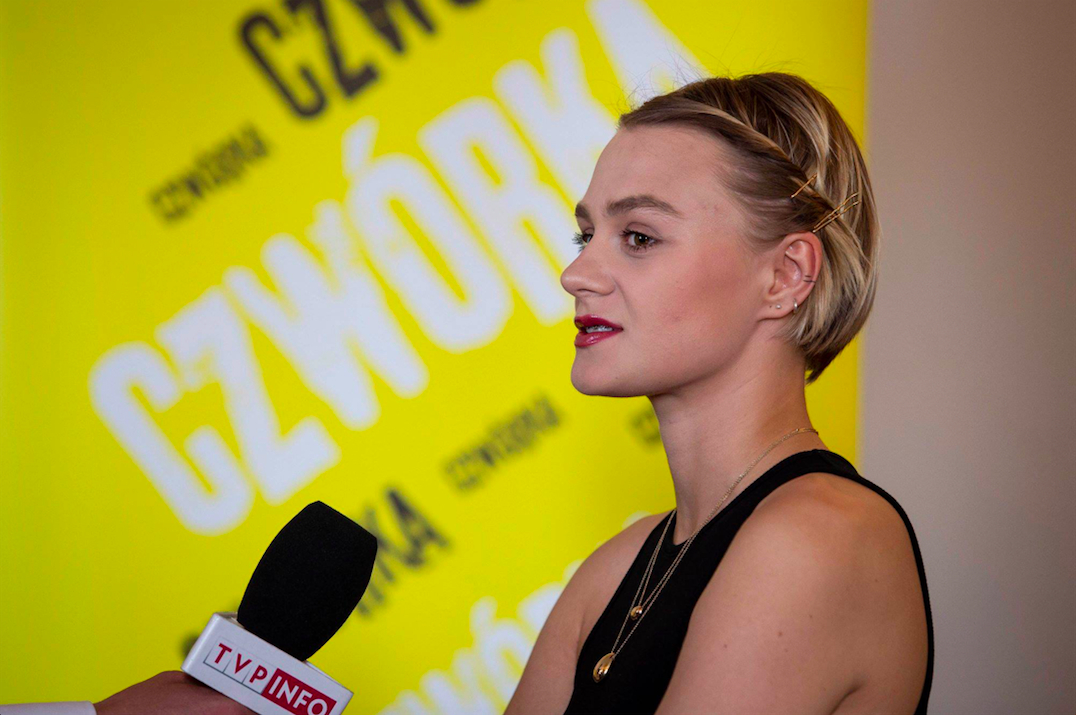 gala plebiscytu "Nieprzeciętni 2018" Czwórki Polskiego Radia